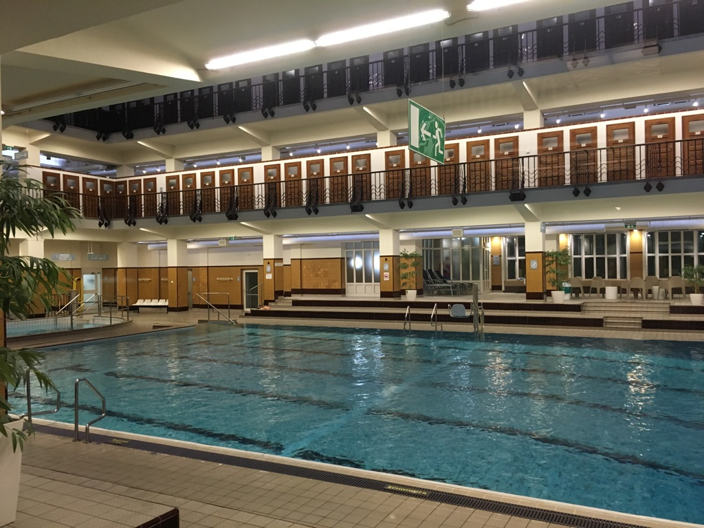 Amalienbad